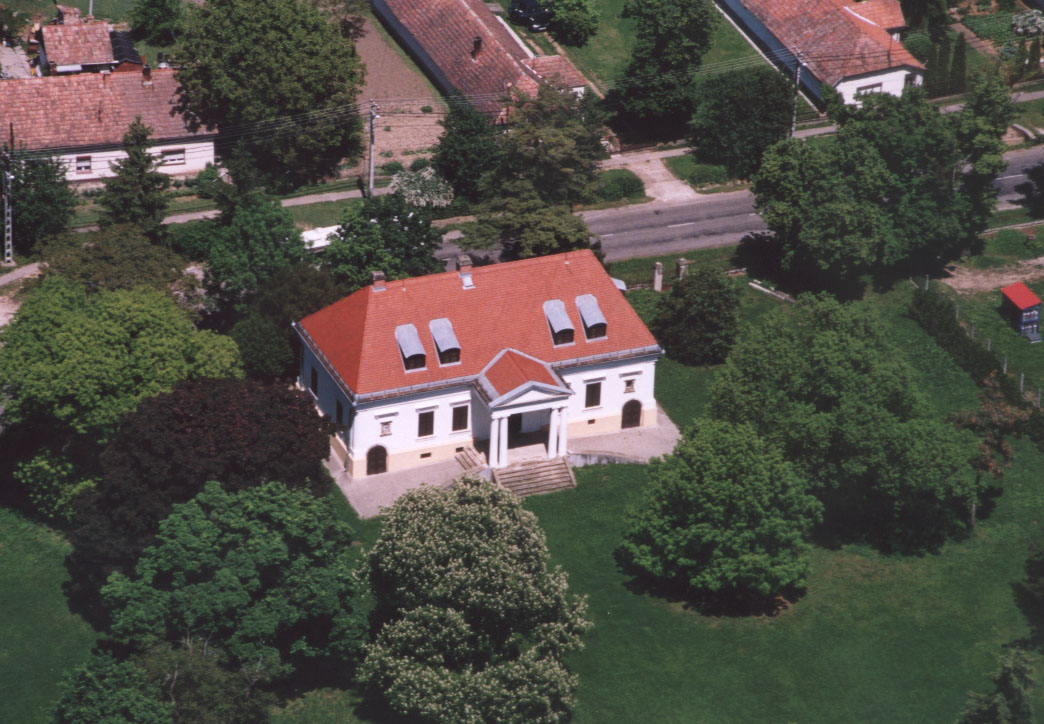 Tereske - Hungary - Europe